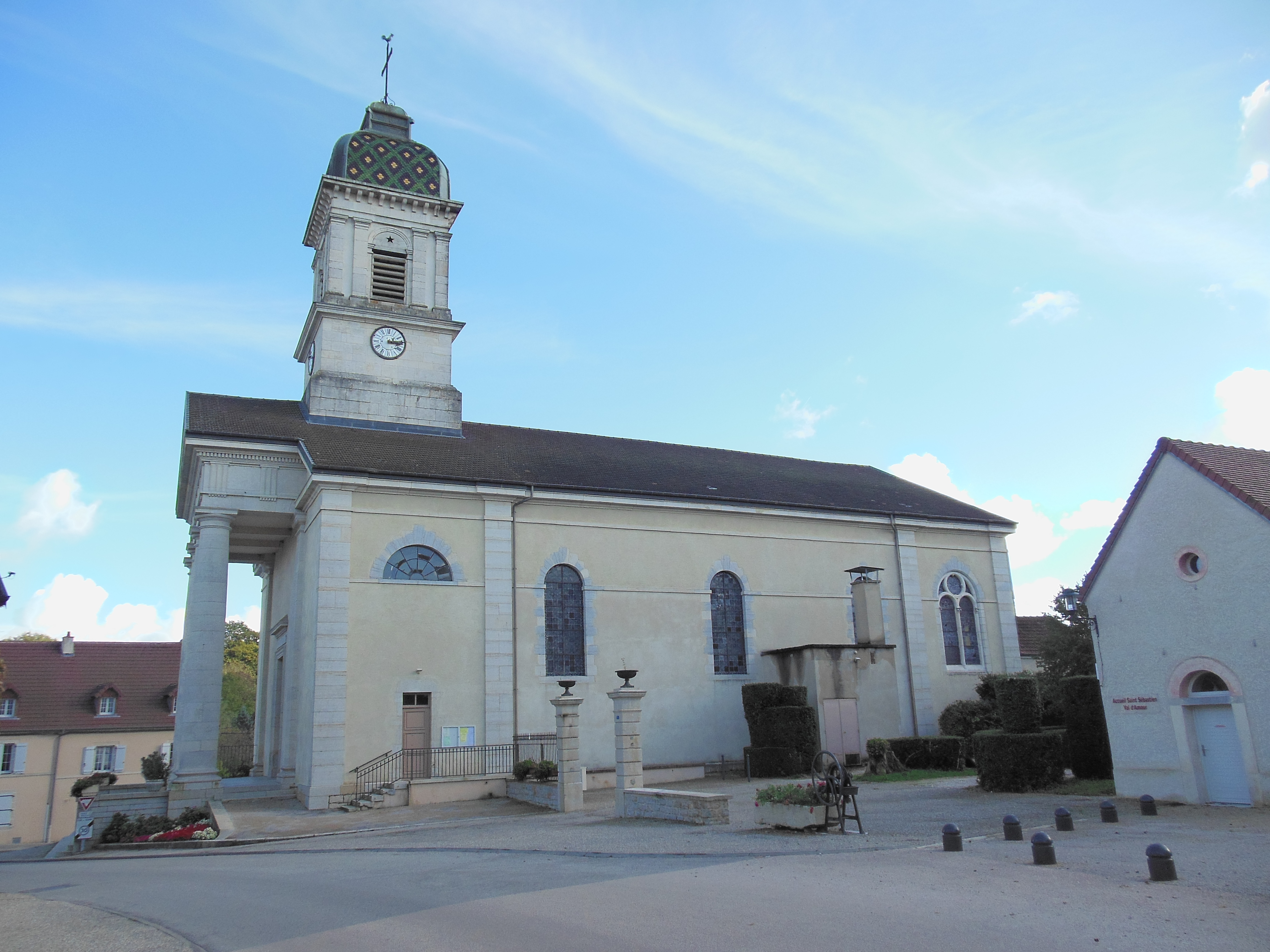 Façade latérale ouest de l'église de l'Assomption (XIXe s), sise rue Jules Grévy, à Mont-sous-Vaudrey (Jura).